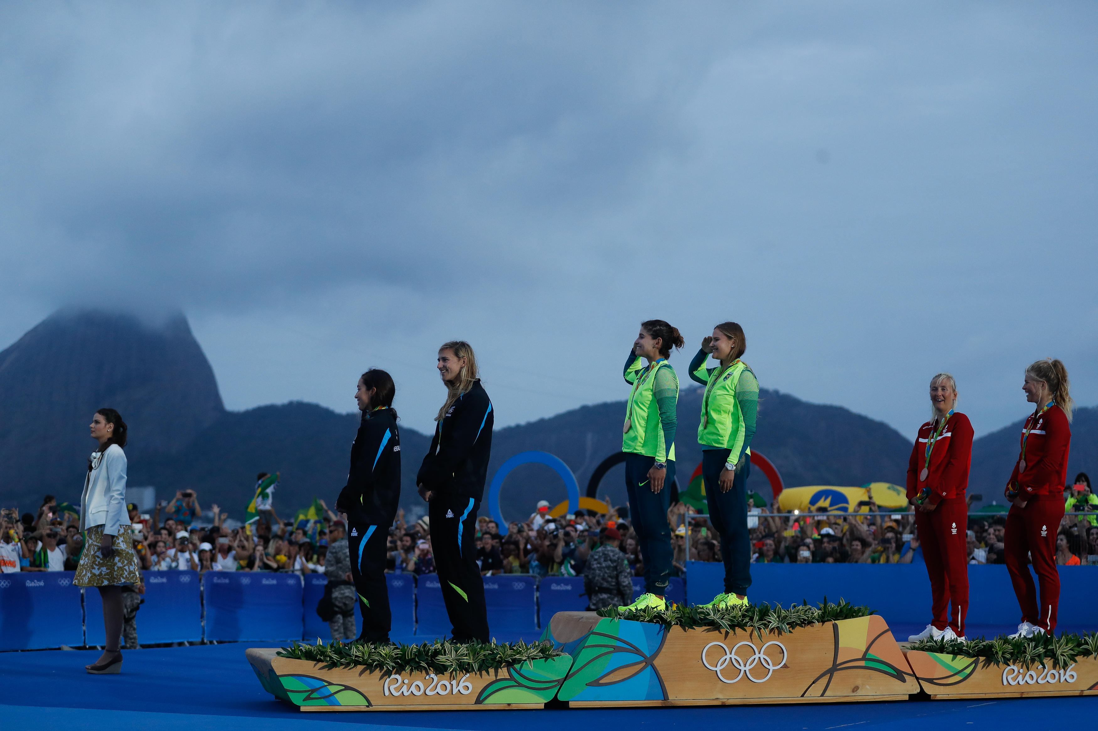 Rio de Janeiro - As brasileiras Martine Grael e Kahena Kunze conquistaram o ouro na classe 49er FX da vela dos Jogos Olímpicos Rio 2016, na regata final na Baía de Guanabara (Fernando Frazão/Agência Brasil)